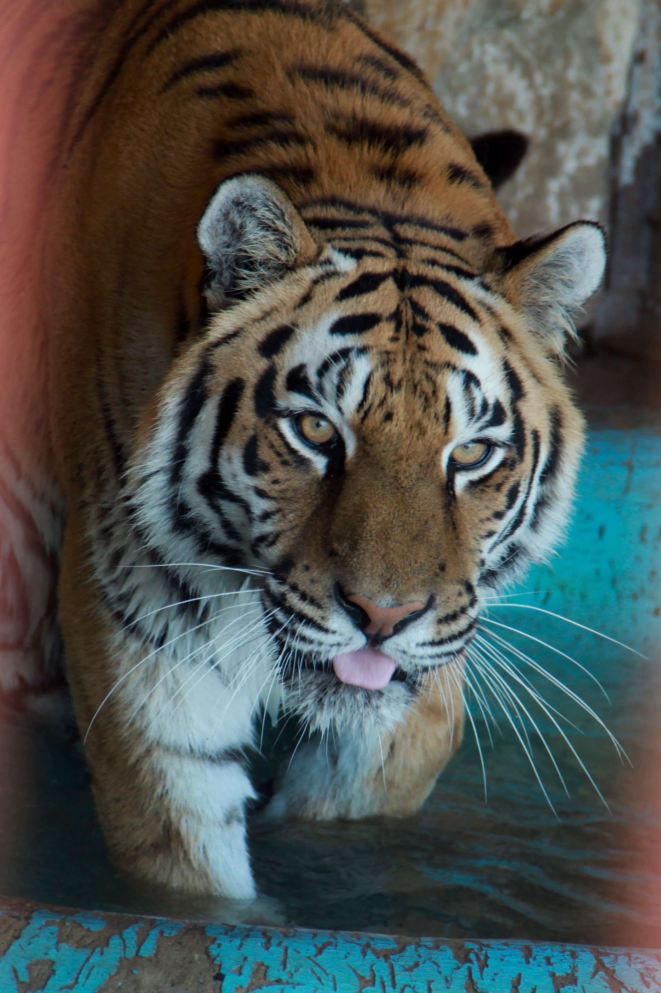 Амурский тигр в Ряжском зоопарке